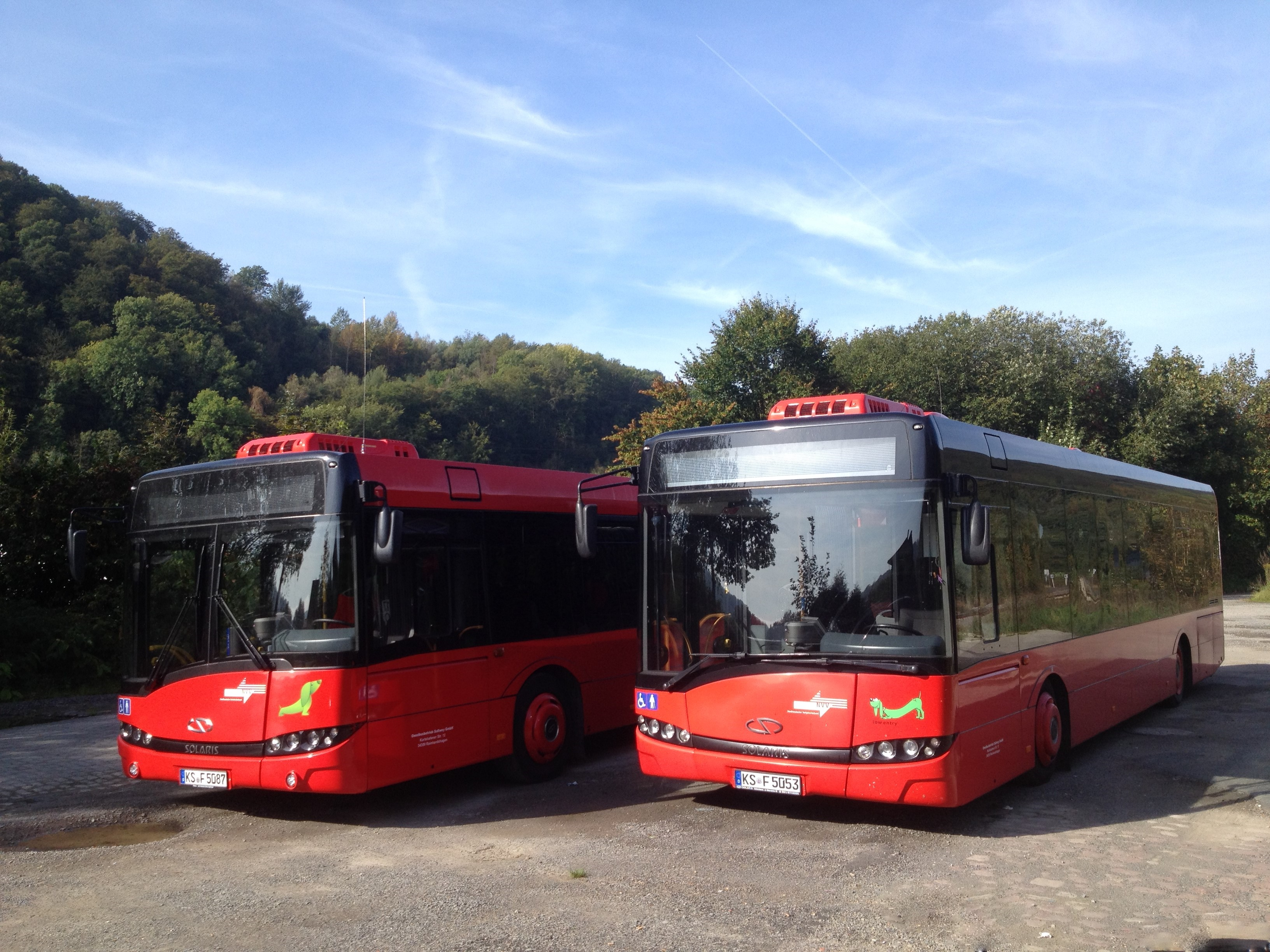 Zwei Busse (Solaris Urbino 12) der Omnibusbetrieb Sallwey GmbH am Bahnhof Bad Karlshafen